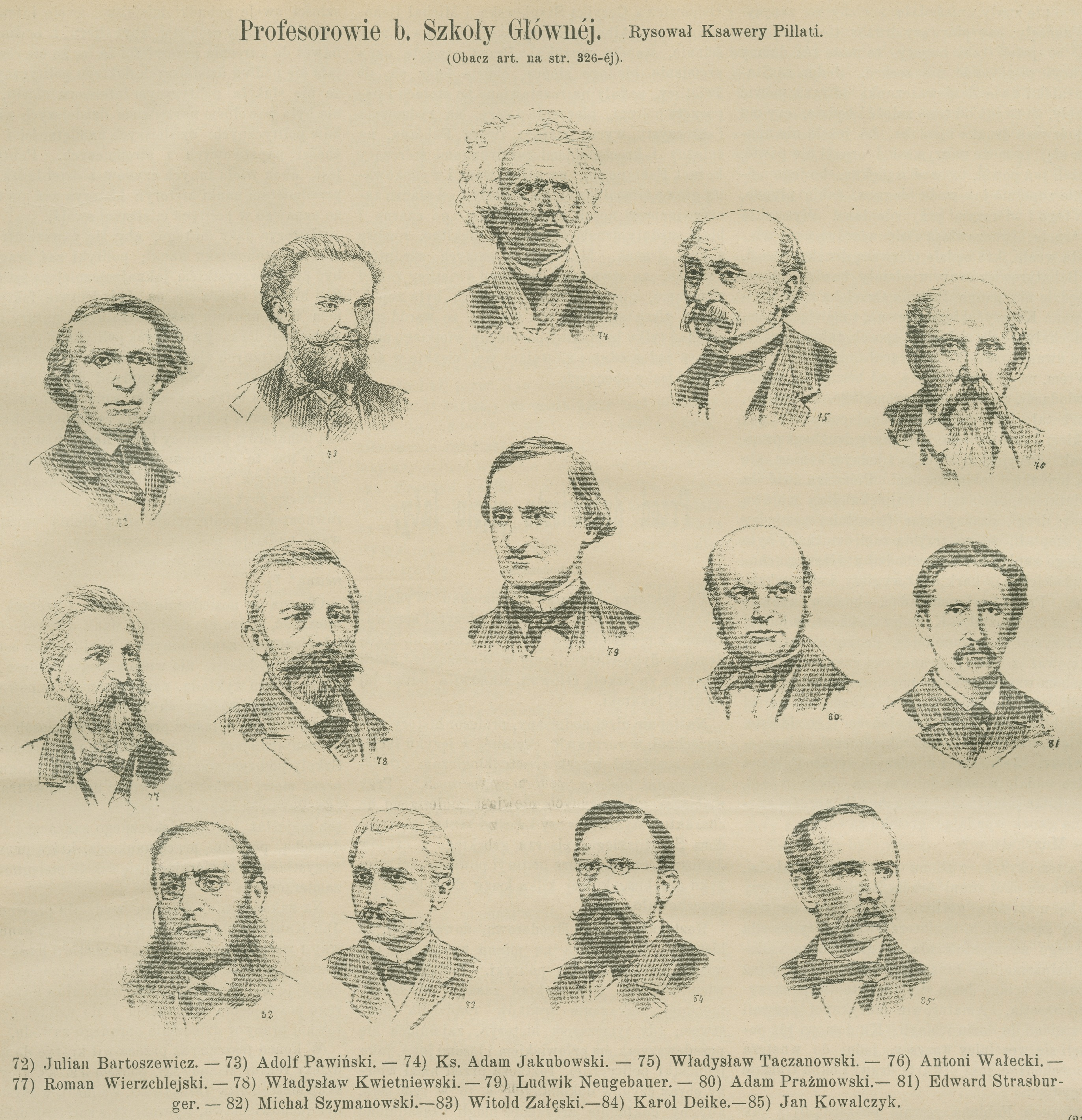 Profesorowie b. Szkoły Głównej : Julian Bartoszewicz ; Karol Deike; Adam Jakubowski [...]